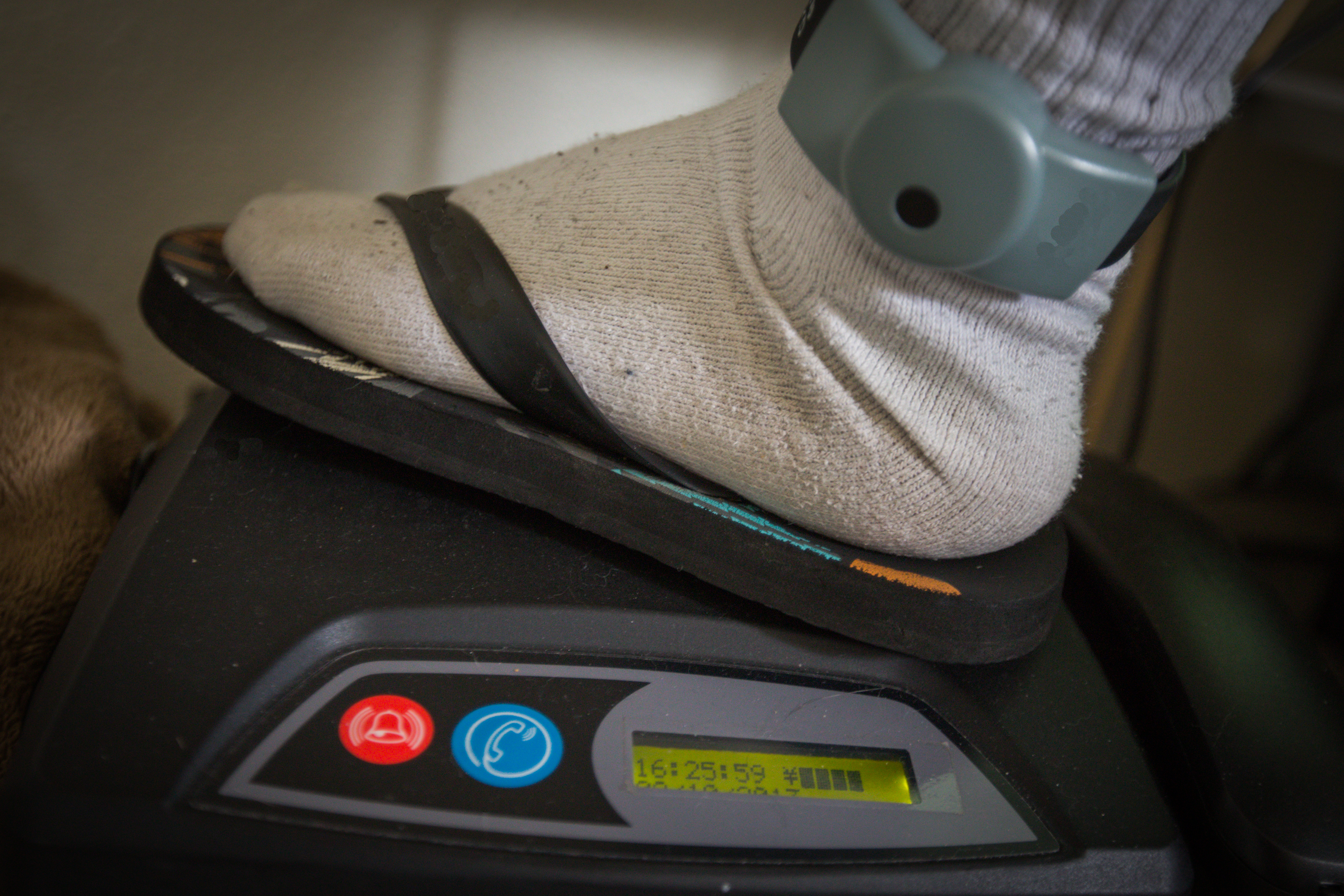 Bracelet de surveillance électronique et centrale.